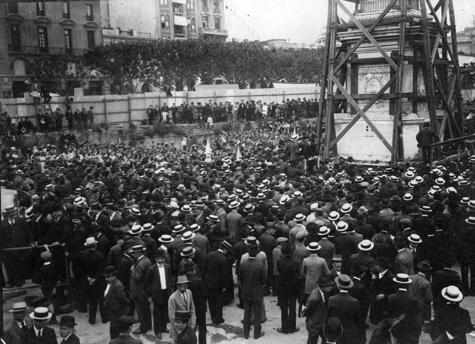 Traslado sobre rieles de la Pirámide de Mayo en Buenos Aires, concretada por la construcción de la actual Línea A del Subte.